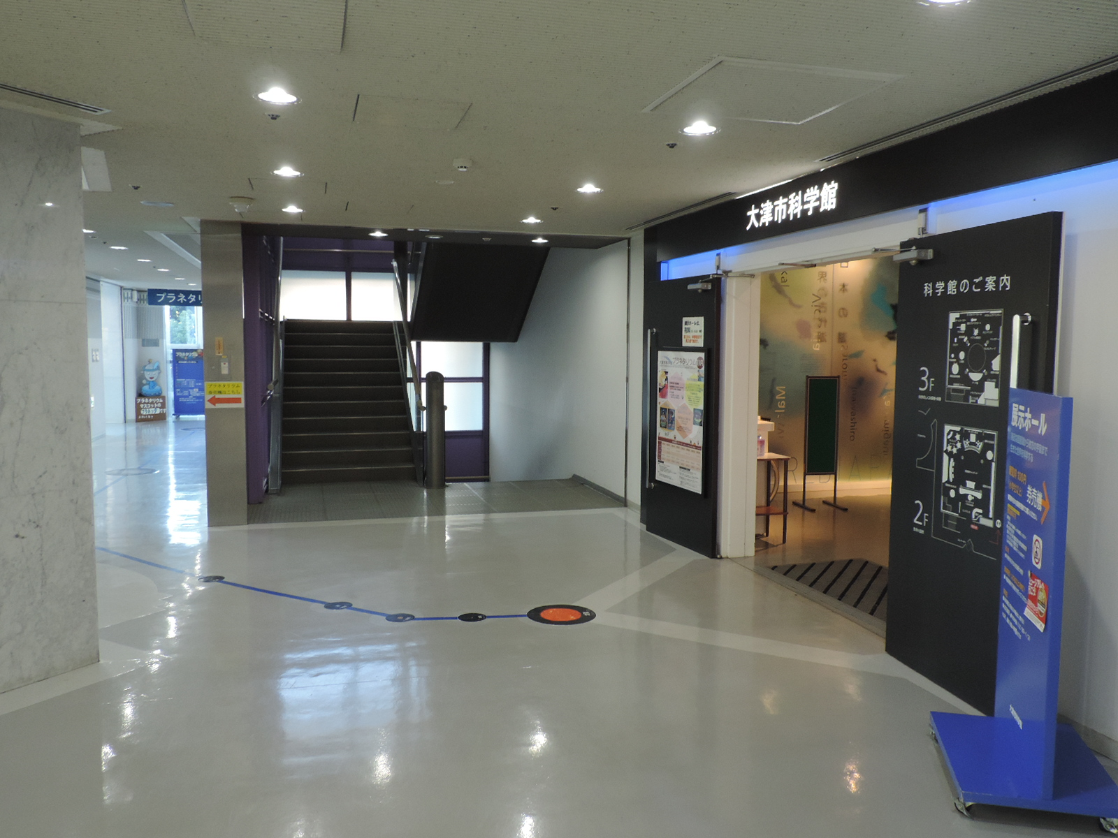 大津市科学館。プラネタリウムは階段左横の通路を進む。2018年11月撮影。